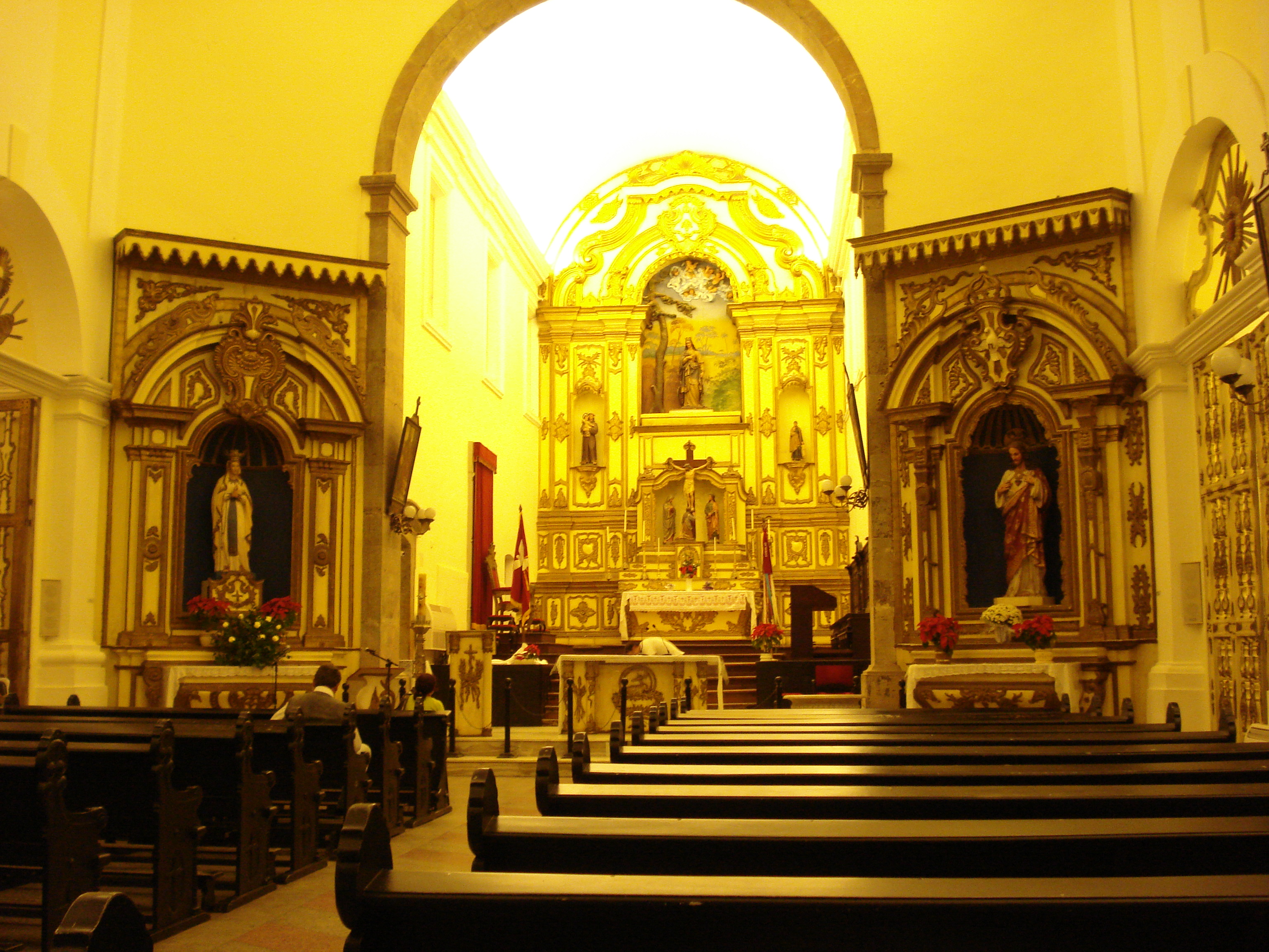 Catedral metropolitana de Florianópolis. Florianópolis-SC-Brasil